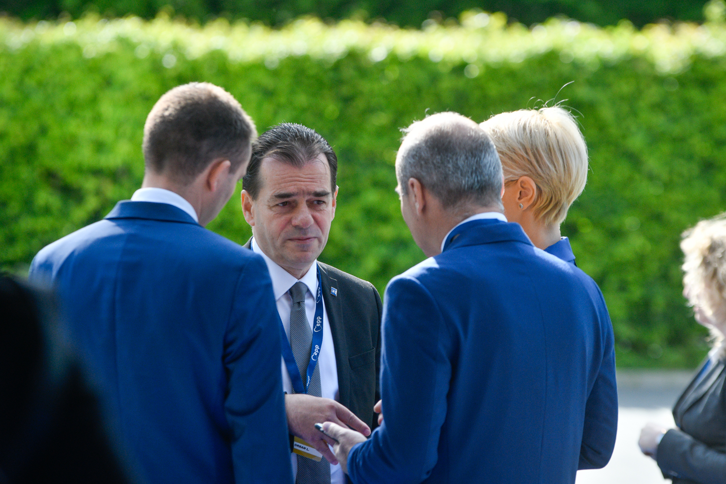 EPP Summit, Sibiu, May 2019